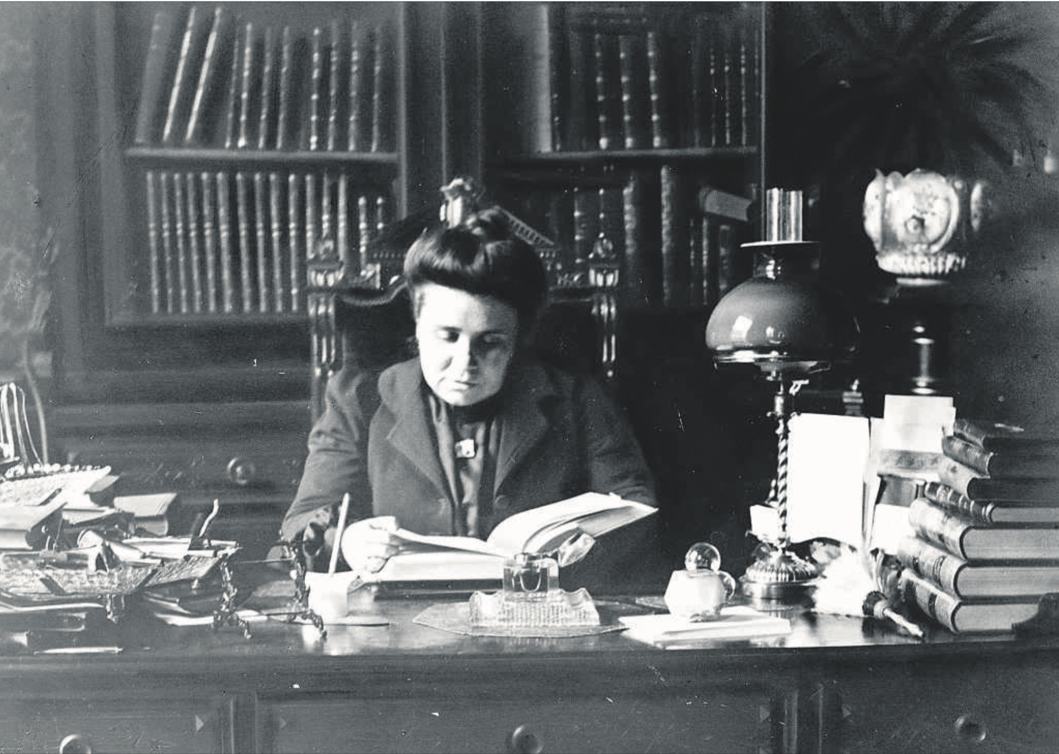 Dolors Aleu no seu despacho.